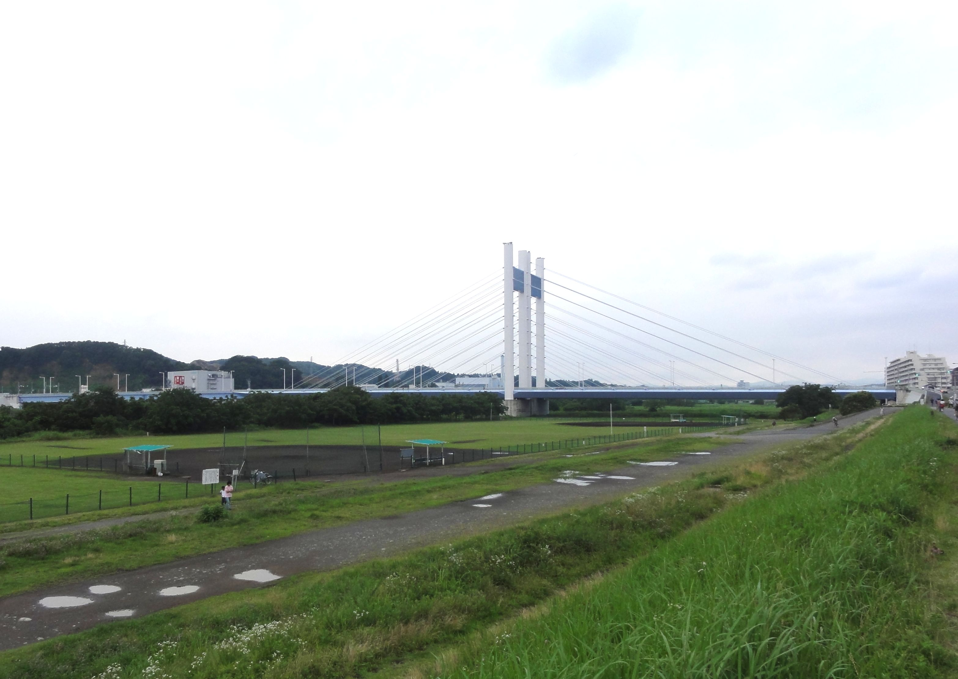 是政橋 府中市是政で撮影